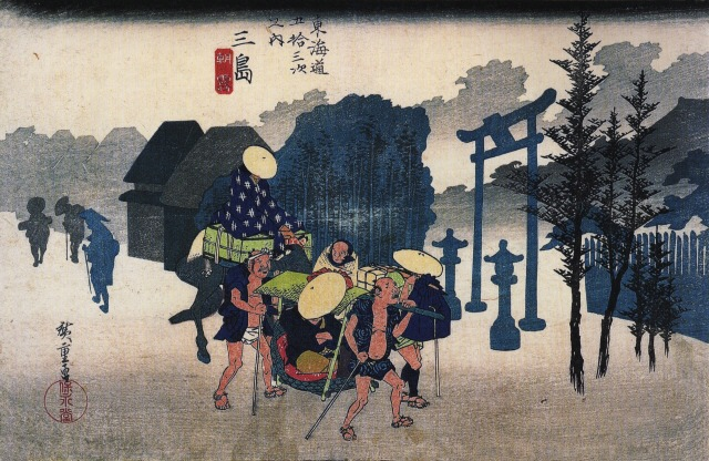 "Tokaido-53tugi Mishima",ukiyo-e by Hirosige.